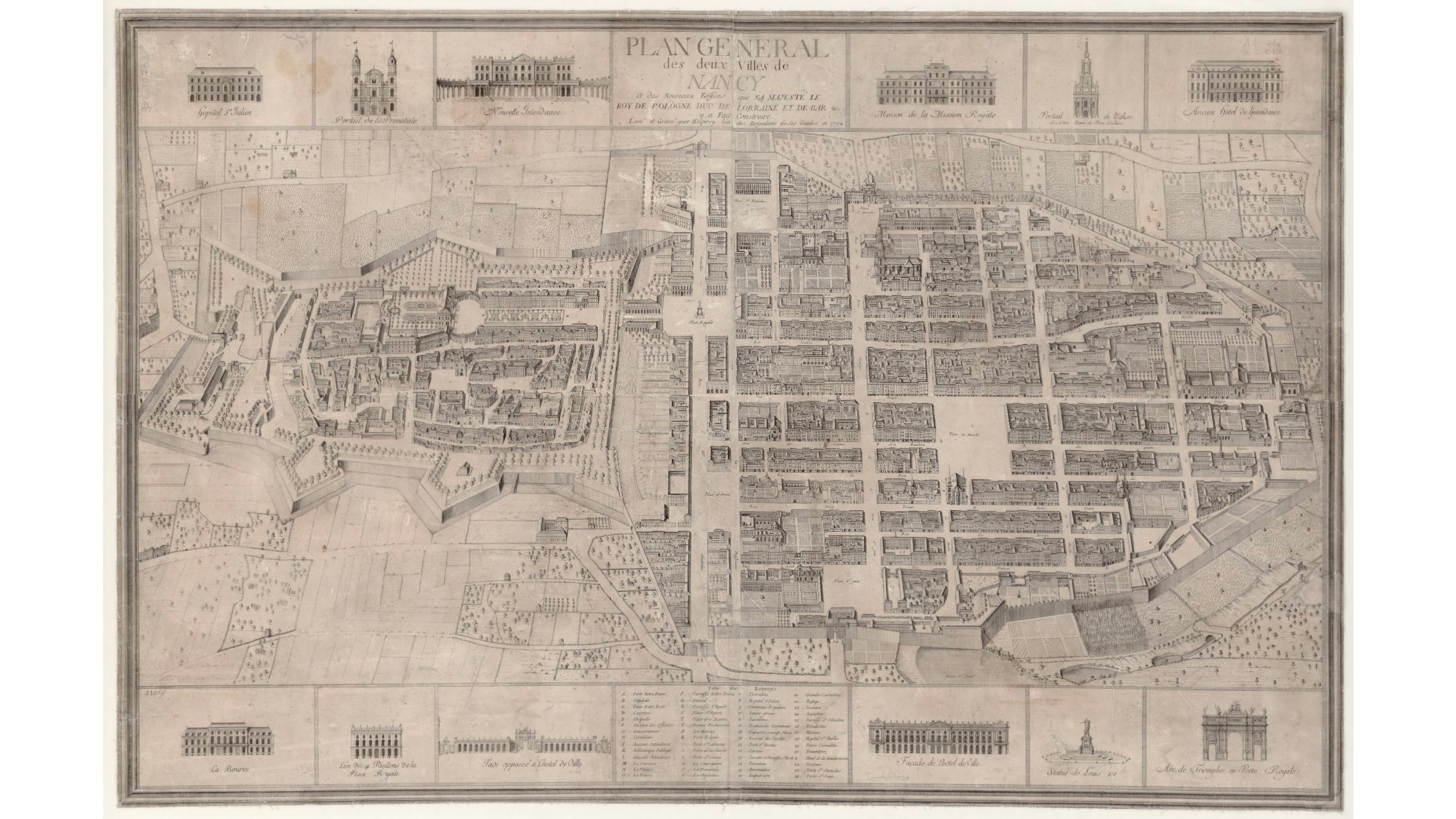 Plan général des deux villes de Nancy et des nouveaux édifices que sa Majesté le Roy de Pologne Duc de Lorraine et de Bar &... y a fait construire. Levé et gravé par Belprey, (lieutenant?) des brigadiers de ses gardes en 1754. Les vignettes autour du plan représentent : - hôpital Saint-Julien - portail de la Primatiale (Cathédrale) - nouvelle intendance (Palais du Gouvernement) - Maison de la mission Royale - Portail de l'église de Notre-Dame de Bonsecours - ancien hôtel de l'intendance - la bourse (tribunal du commerce) - l'un des 4 pavillons de la Place Royale - Face opposée à l'hôtel de ville - Façade de l'hôtel de ville - statue de Louis XV - Arc de Triomphe ou Porte Royale